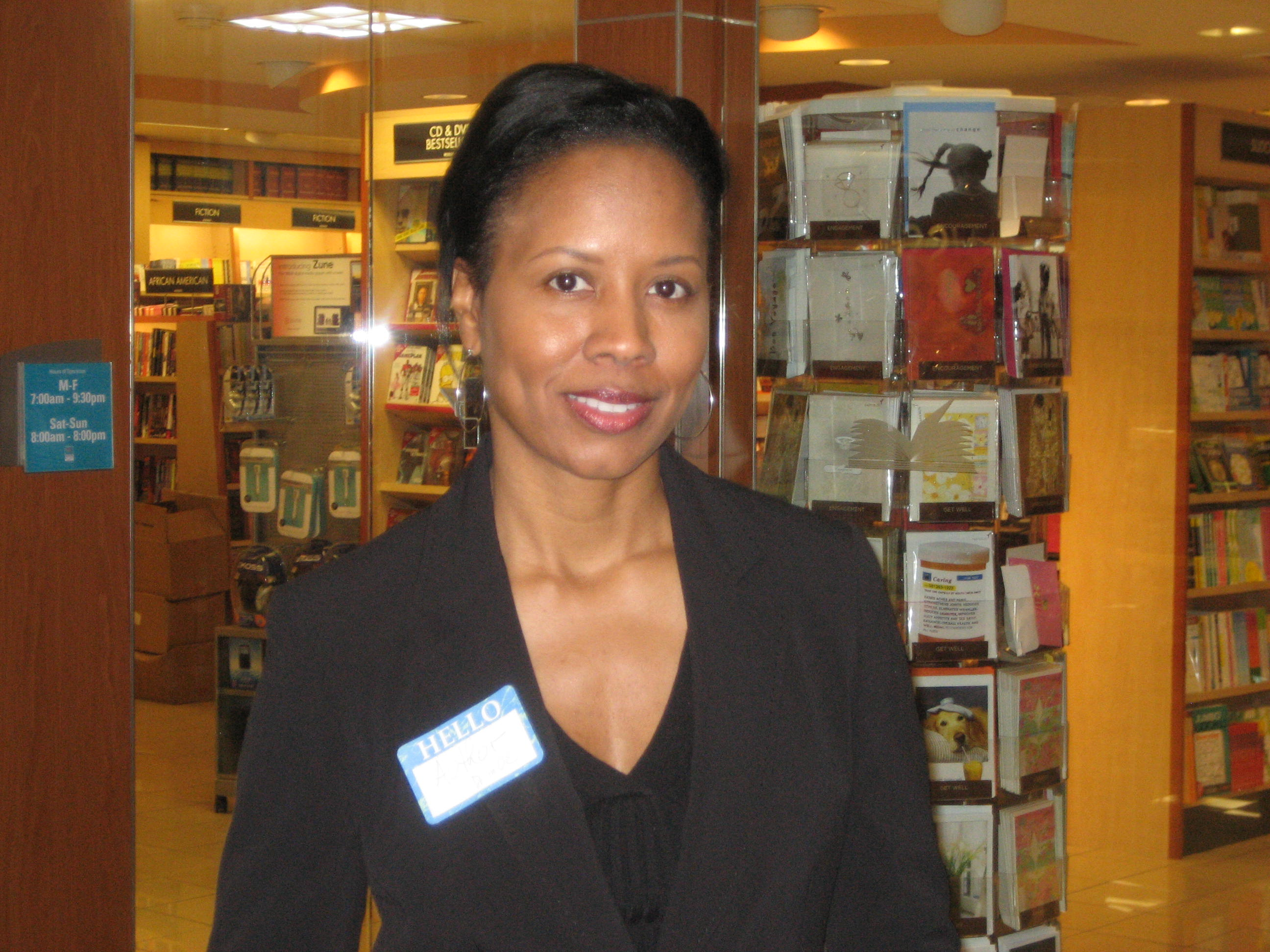 Monica "Dr. Moe" Anderson